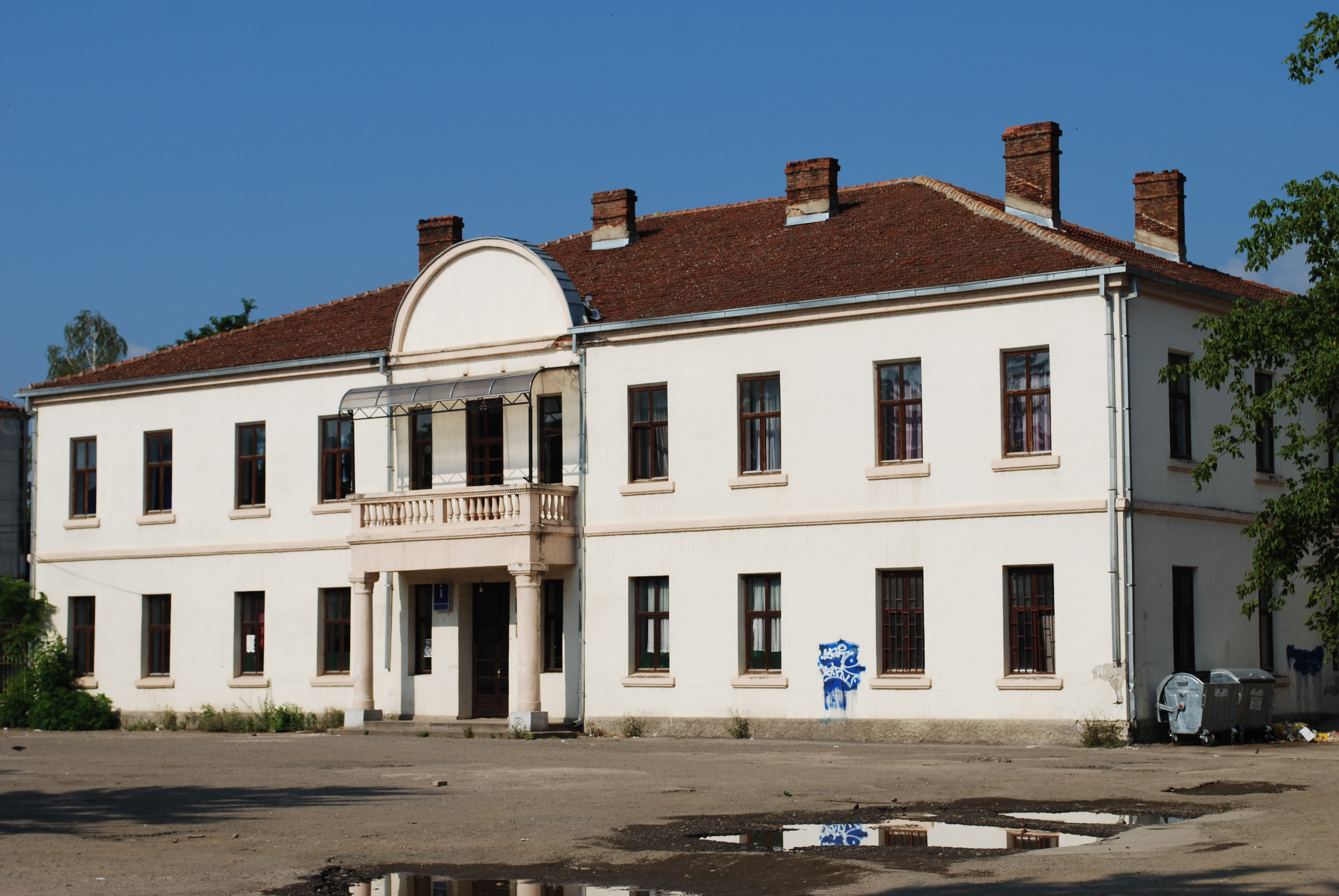 Стара сграда на ОУ „Братя Миладинови“ в Струга